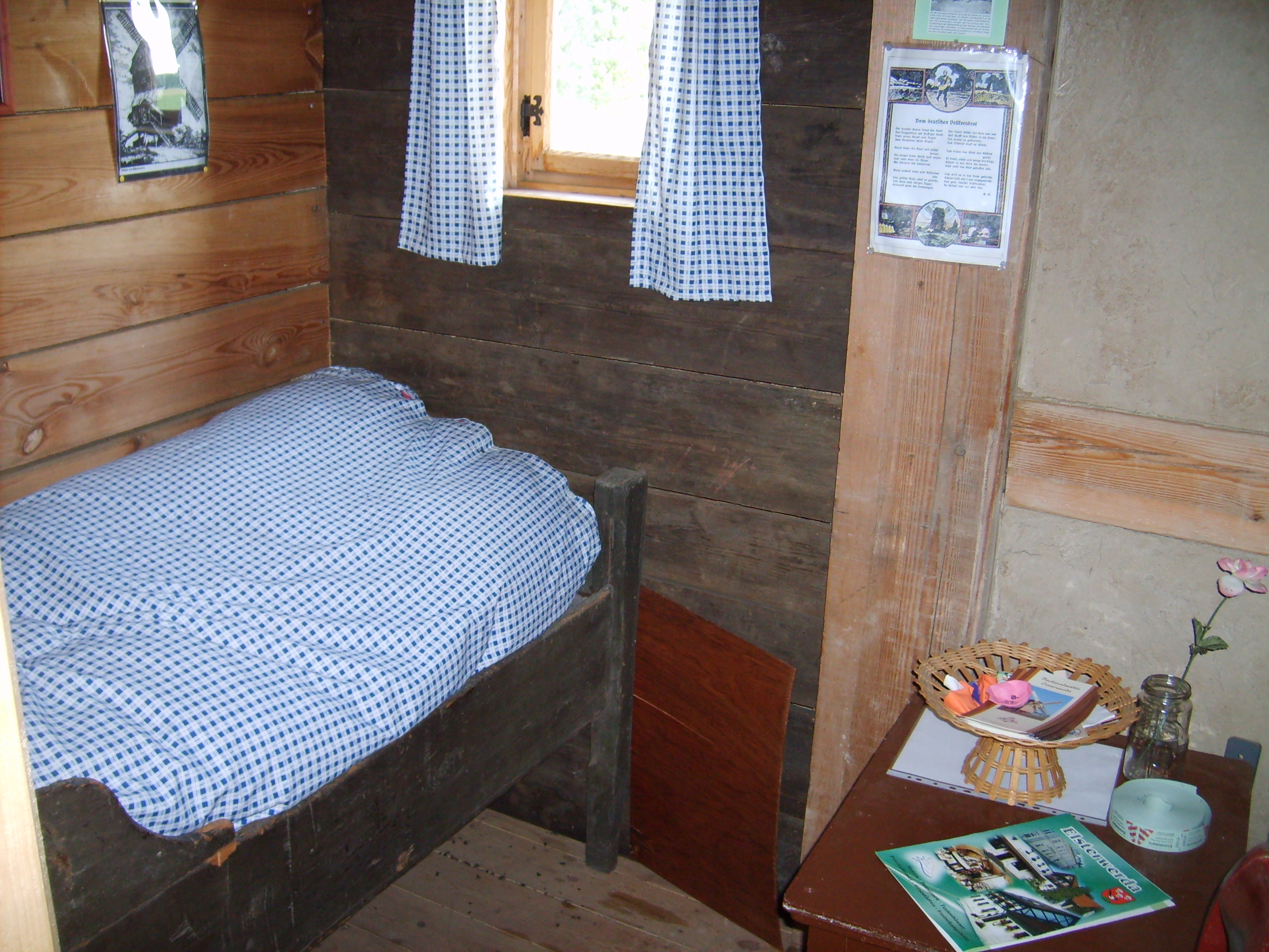 Die Schlafkammer der Mühle Elsterwerda. Kastenbett, Bettbezug.